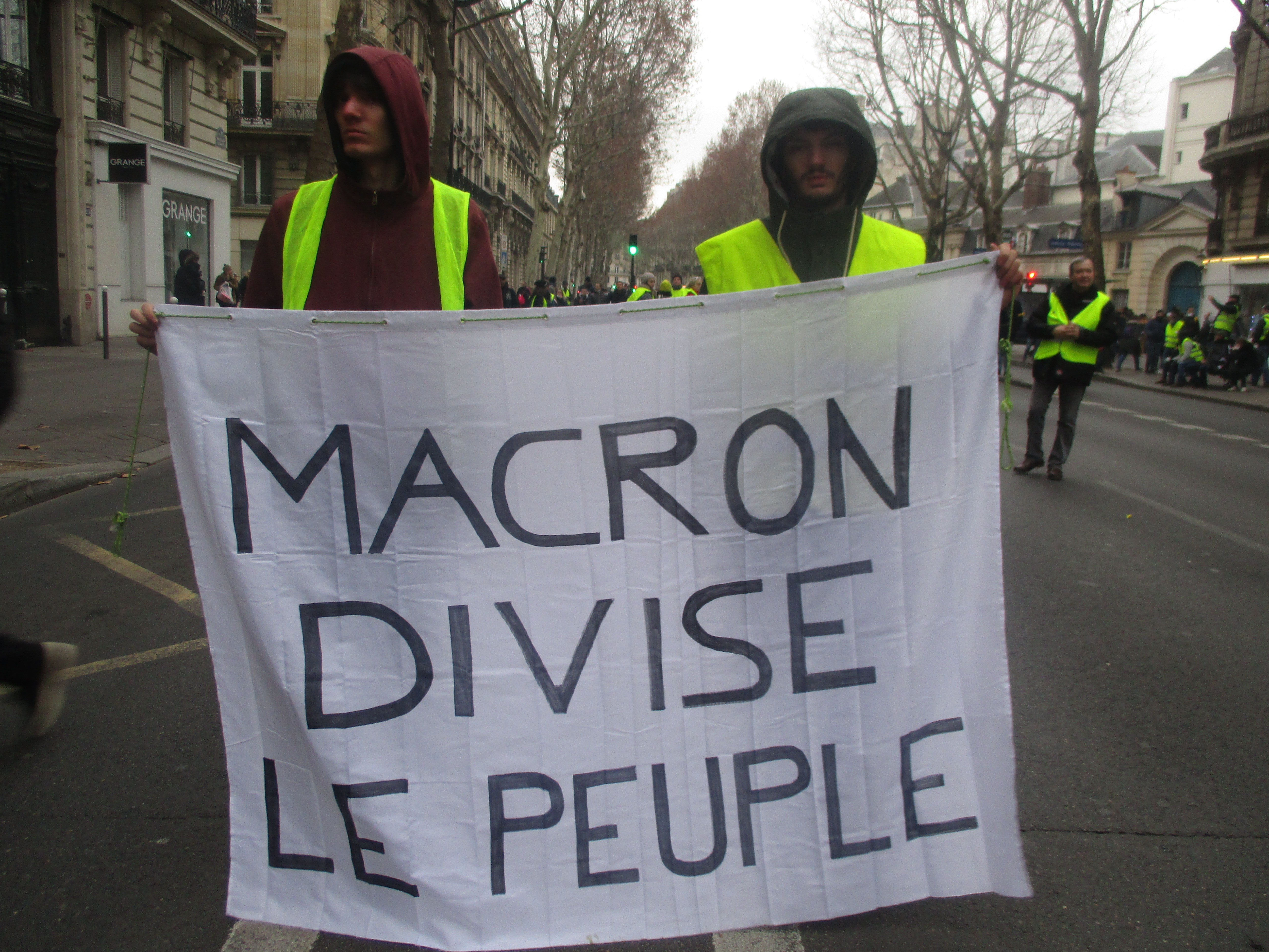 Banderole contre Emmanuel Macron, boulevard Saint-Germain, le 5 janvier 2019 pendant la manifestation des gilets jaunes.